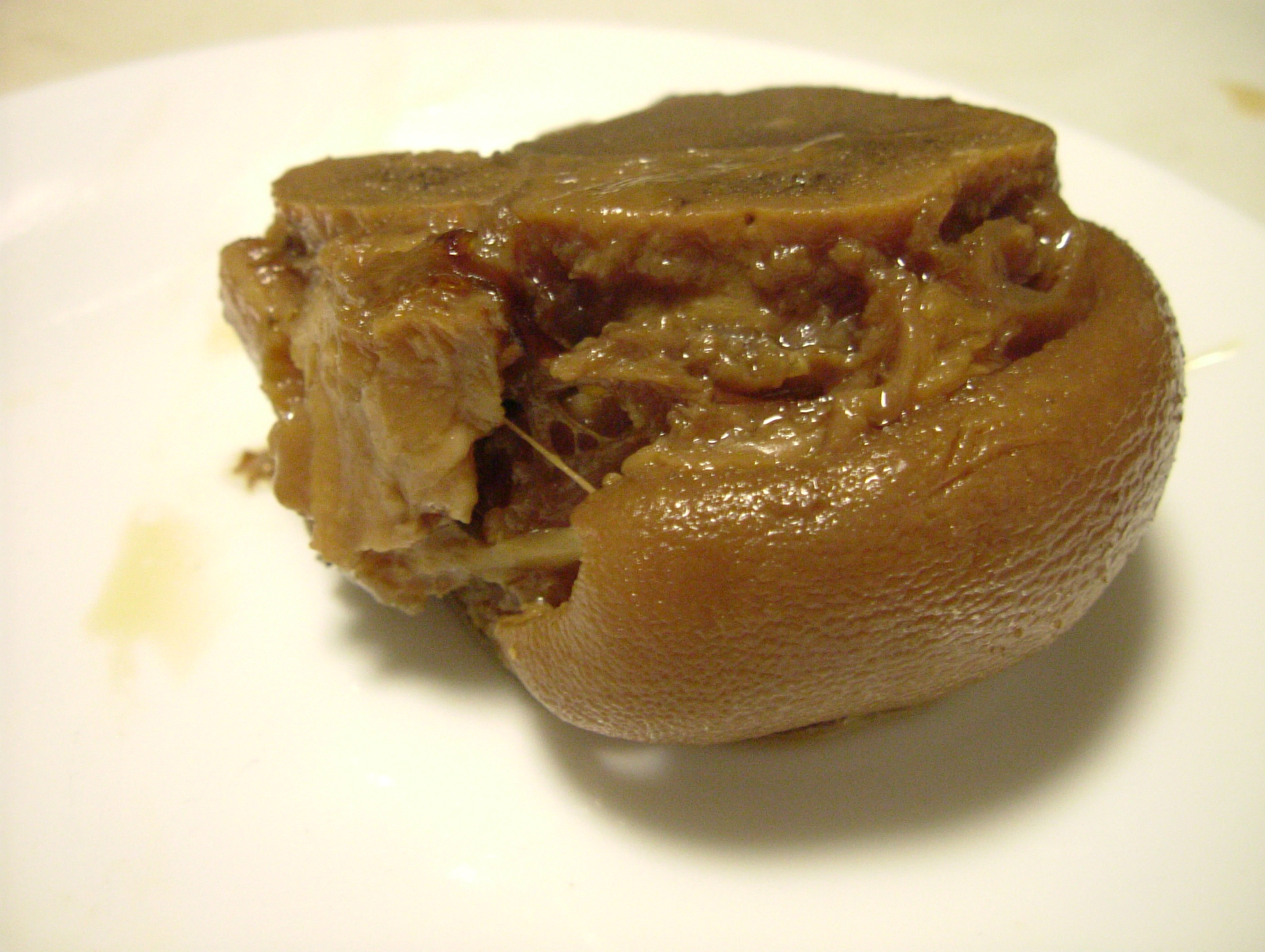 豬腳